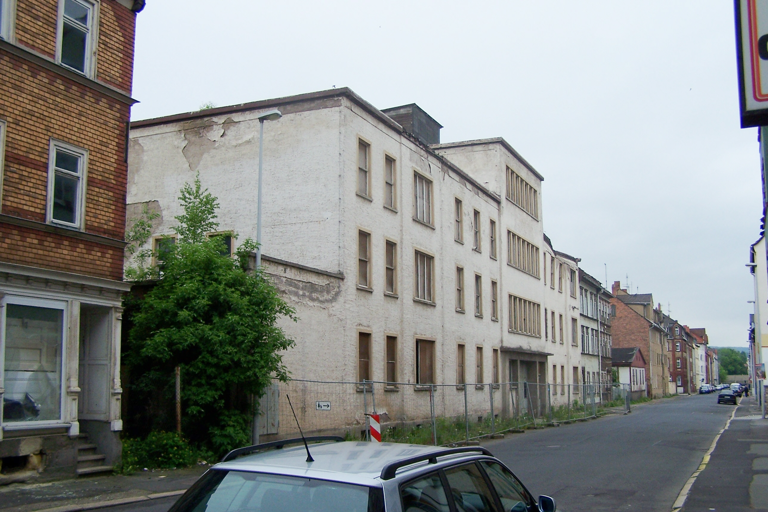 Blick in die mittlere Oppenheimstraße Eisenach, in Bildmitte das im Sommer 2011 abgerissene FER-Verwaltungsgebäude.